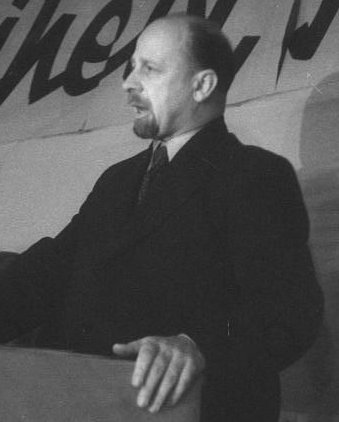 Walter Ulbricht; cropped version of Image:Bundesarchiv Bild 183-V01850, Berlin, Walter Ulbricht am Rednerpult.jpg